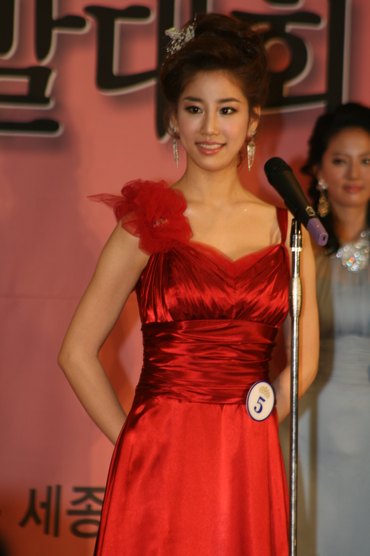 2009 미스코리아 서울 진 김주리 드레스 심사